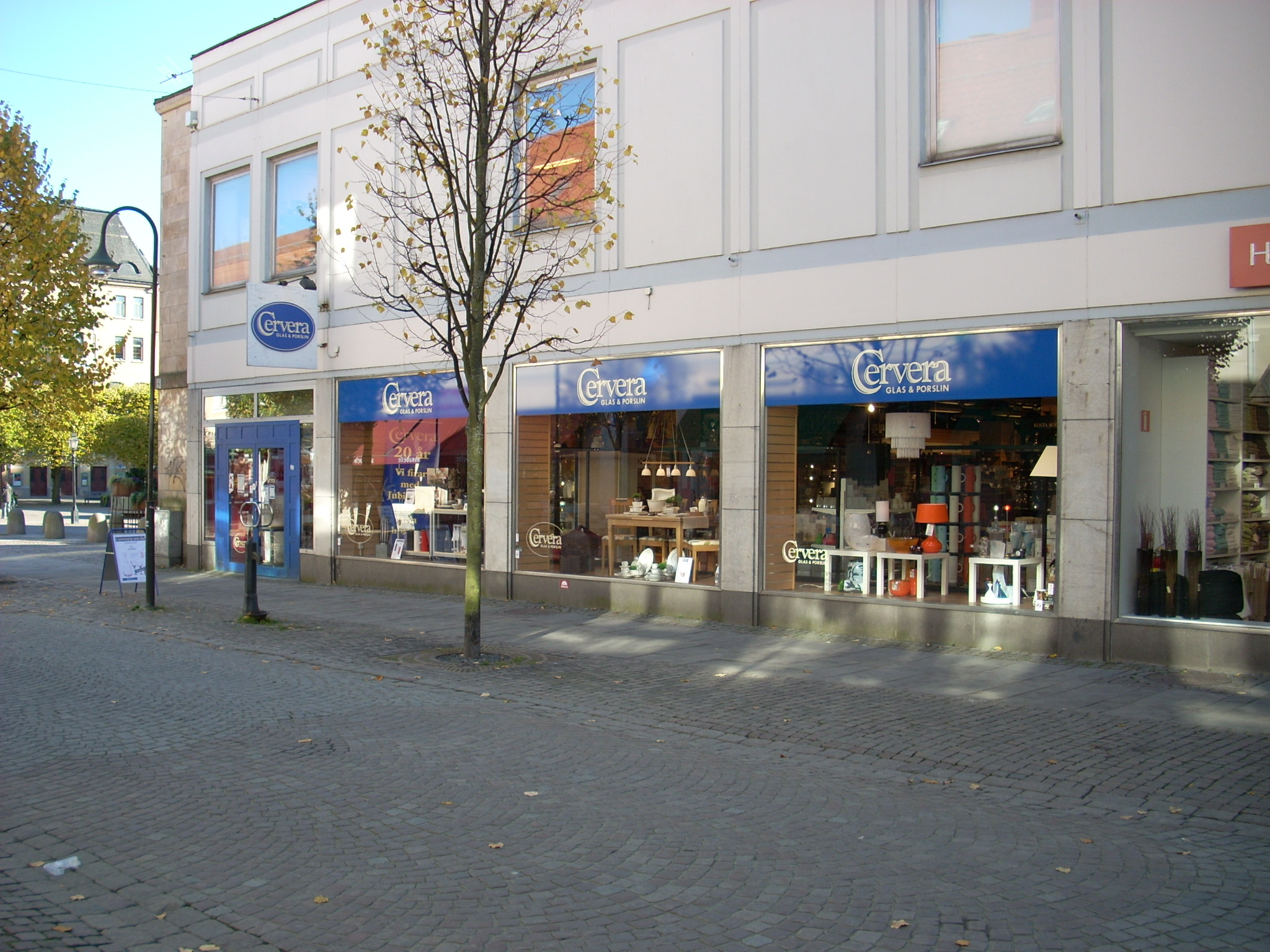 Cervera-butik i Jönköping